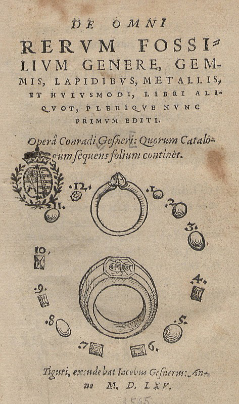 Original image description from the Deutsche FotothekBergbau & Geologie & Gestein & Schmuck & Ring